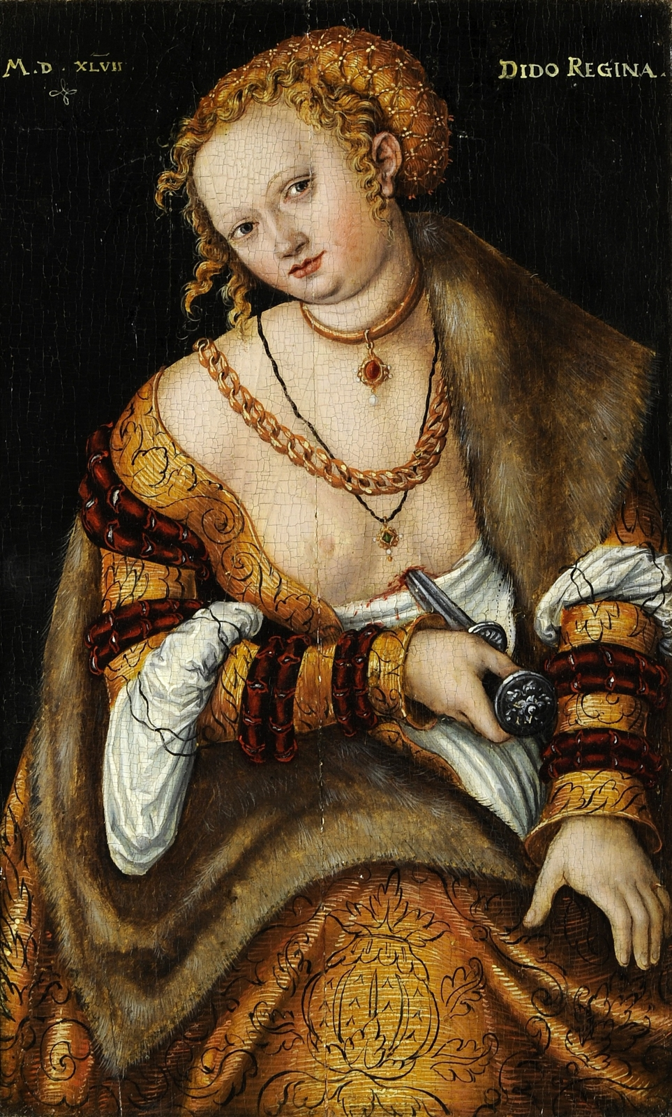 Карфагенская царица Дидона (Carthaginian Queen Dido)_1547_27 х 17_д.,м._Кобург, Худож. собрание замка Кобург